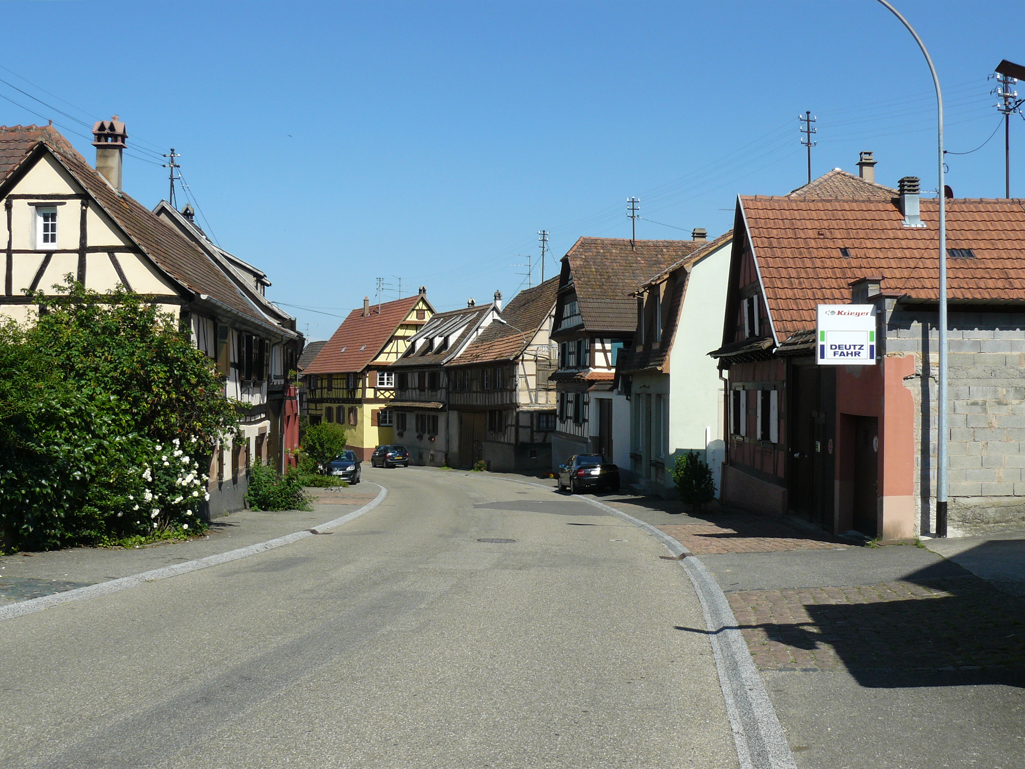 Le village (rue principale) et les maisons à colombages